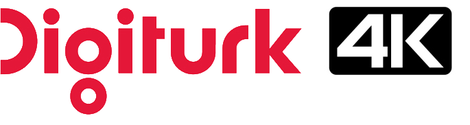 orjinal